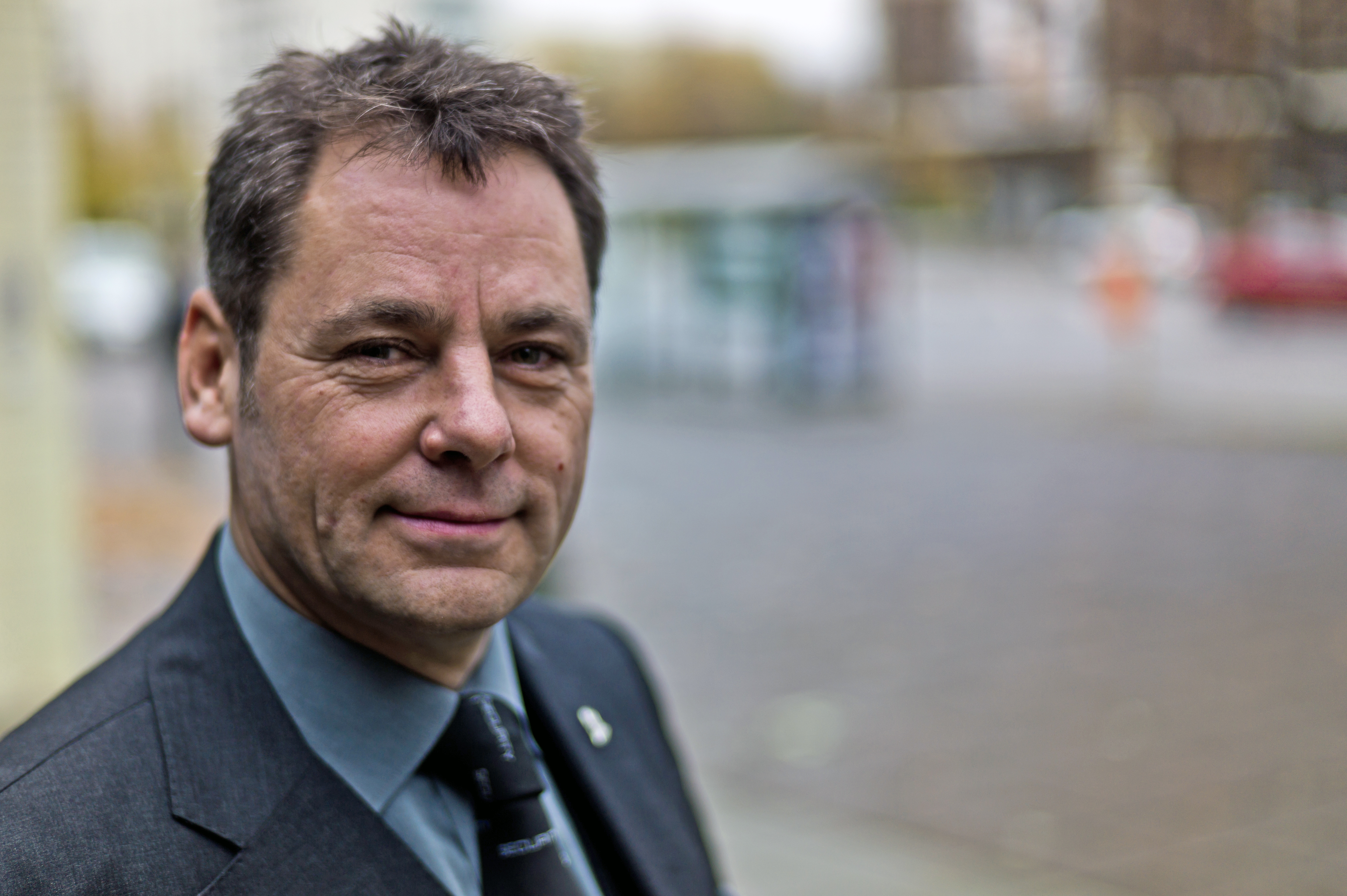 Foto von padeluun.